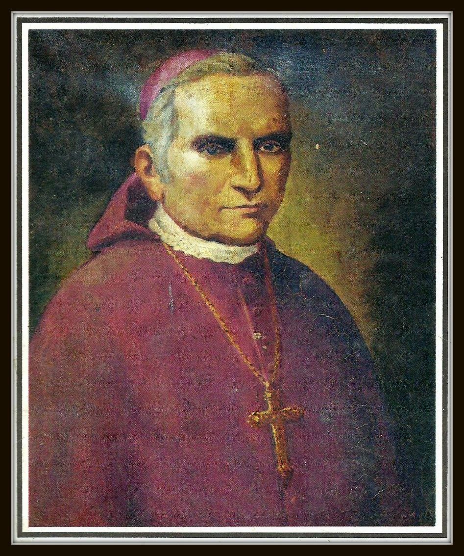 Pintura al Óleo del Procer Jose Vicente de Unda y Garcia